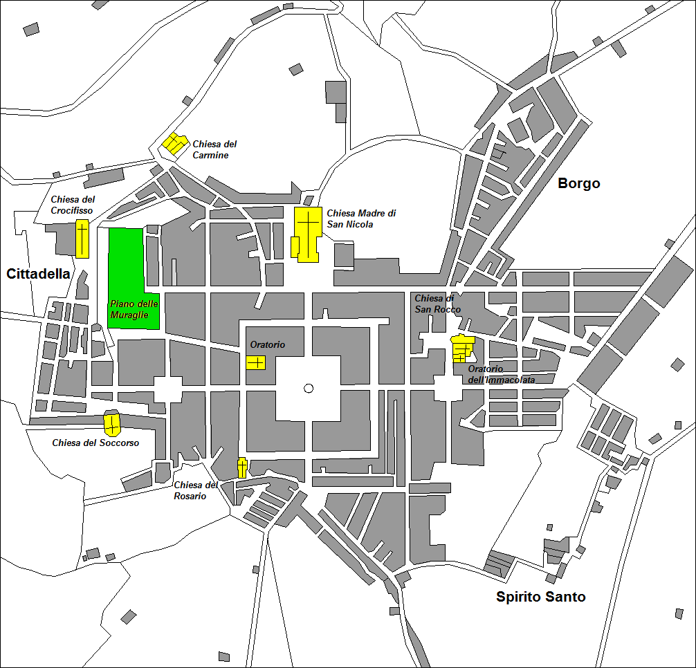 Pianta della città di Palmi sul finire del XIX secolo